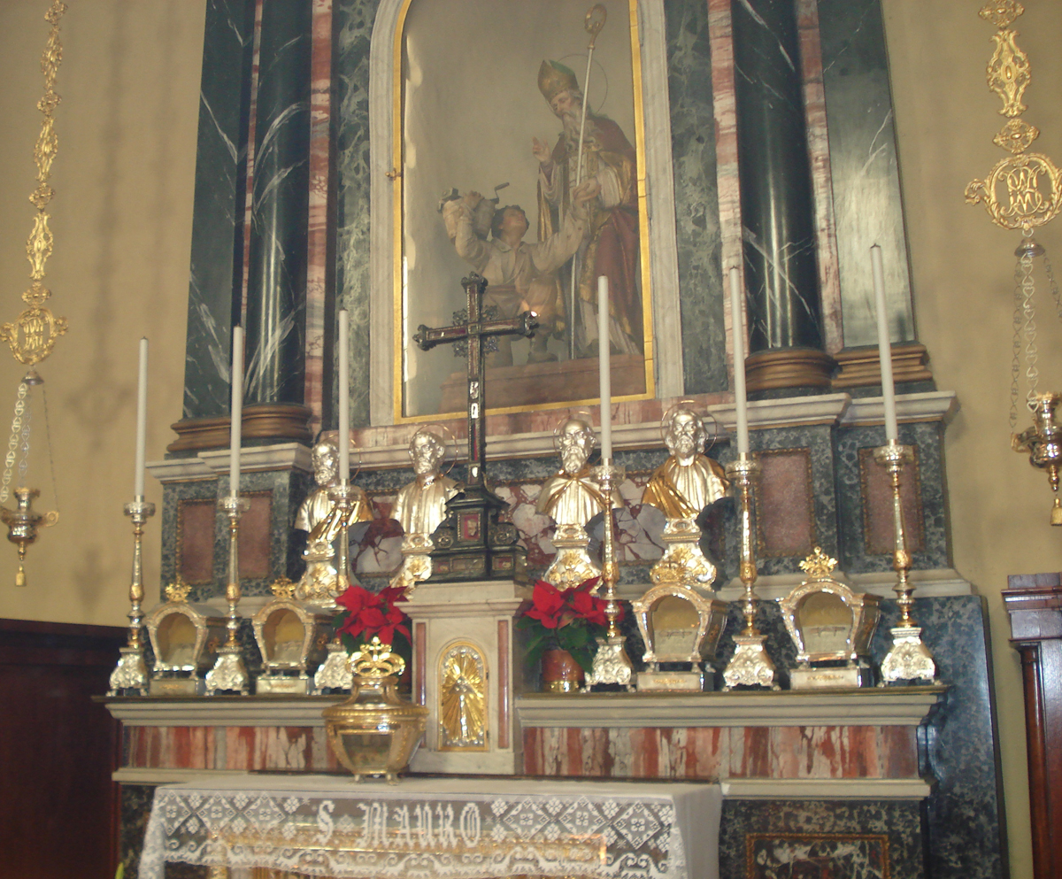 Cornaredo, Chiesa parrocchiale dei Santi Giacomo e Filippo, interno. L'altare di San Mauro, compatrono della parrocchia di Cornaredo.